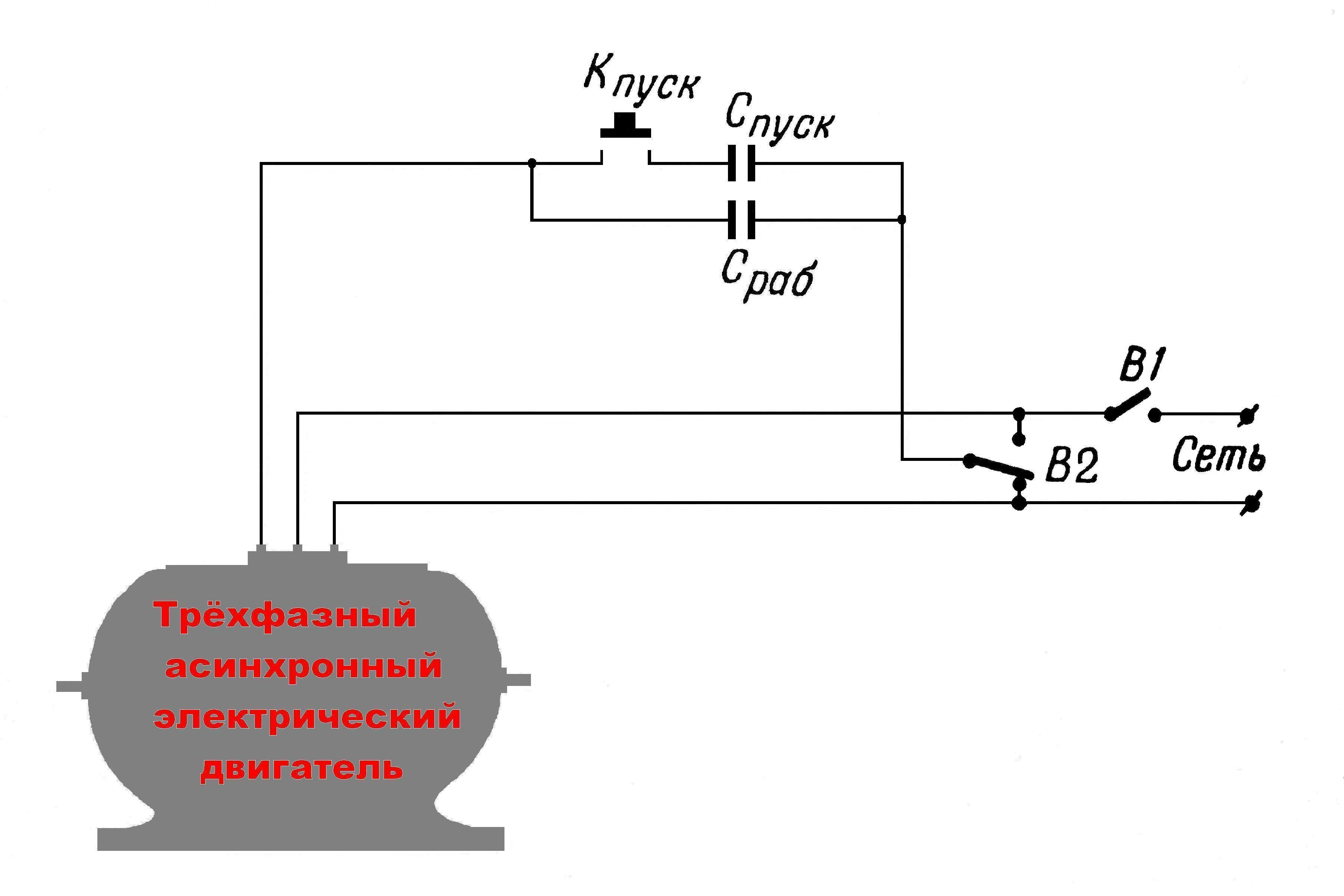 Трехфазный двигатель в однофазной сети